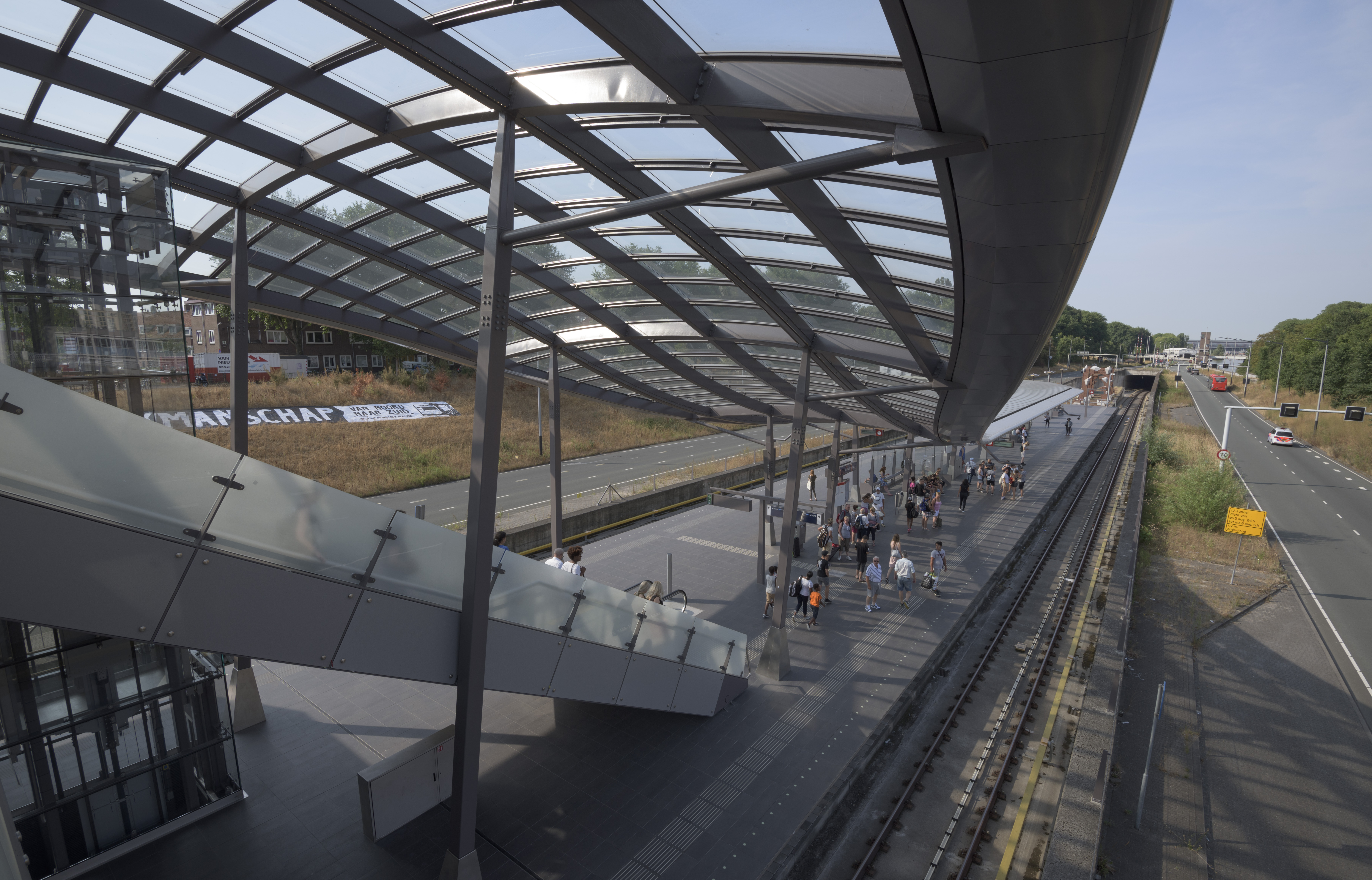 Metrostation Noorderpark van de NoordZuid lijn.